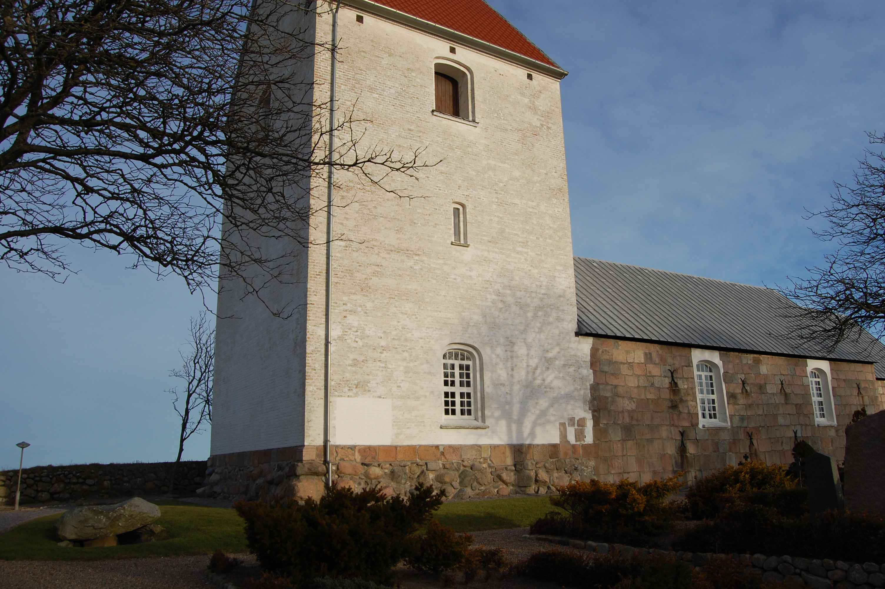 Nederst til venstre i billedet ses bronzealdergraven ved Horne Kirke - ved Hirtshals, Hjørring Kommune.